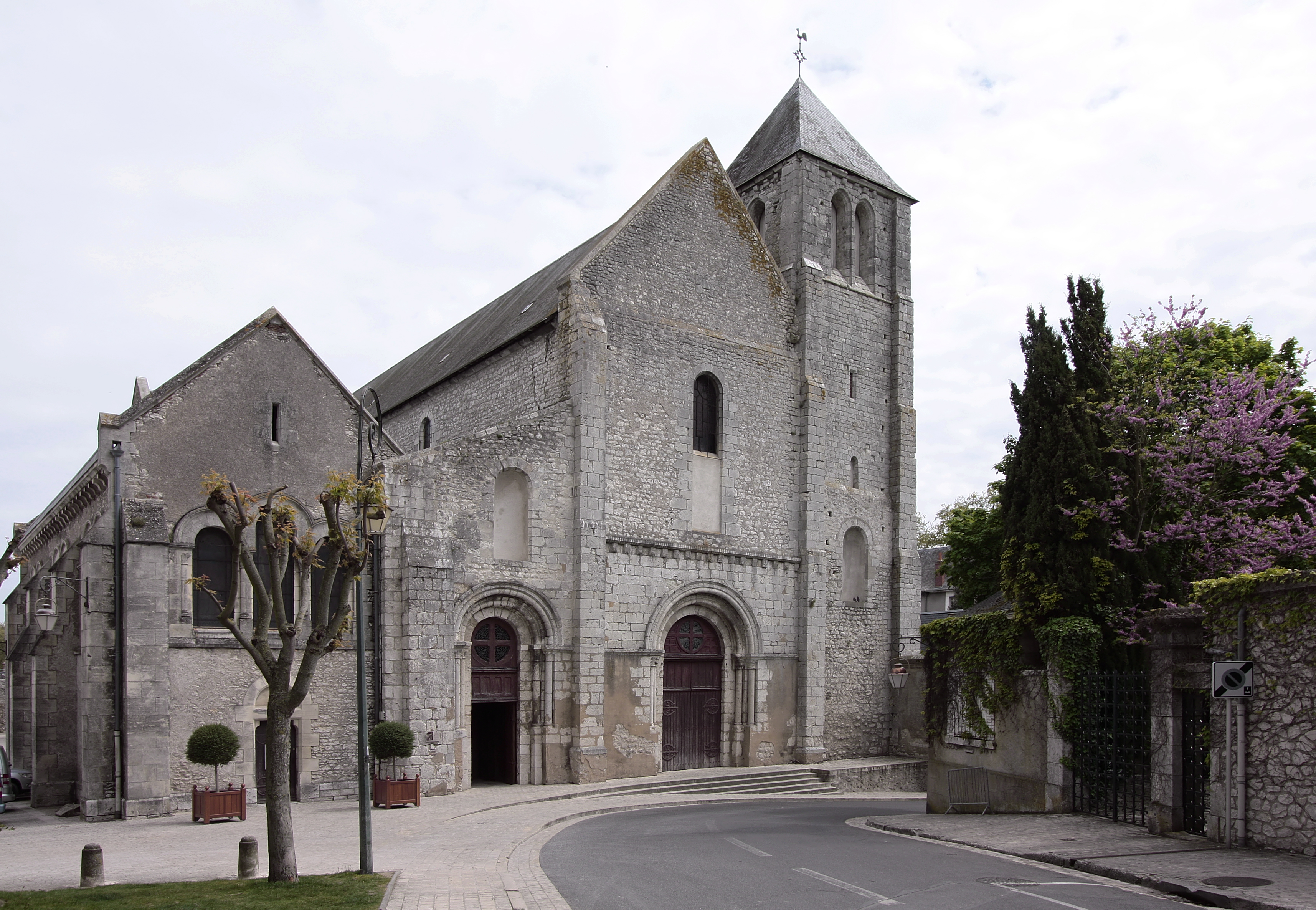 Beaugency, Ortschaft im Département Loiret/Frankreich - Ansicht der Kirche Notre-Dame aus dem 12. Jahrhundert.